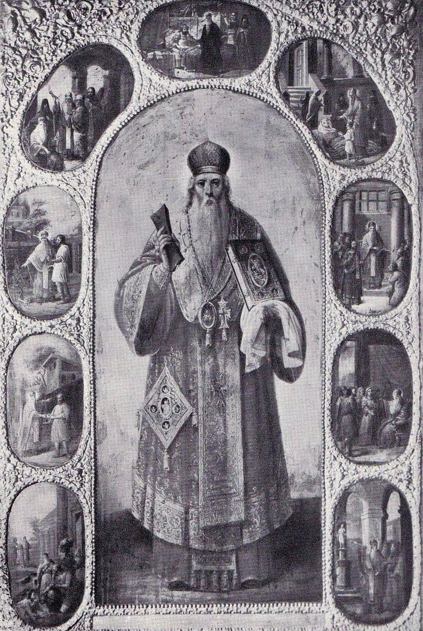 Nicolae Grigorescu - Icoana Sfântul Spiridon de la Biserica Sfântul Alexe din București, România